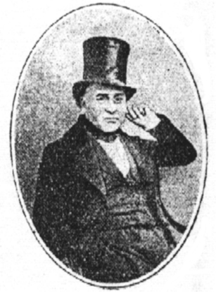 Capsule du Livre "Mines de Charbon en Anjou", Dr. Olivier Couffon, 1911